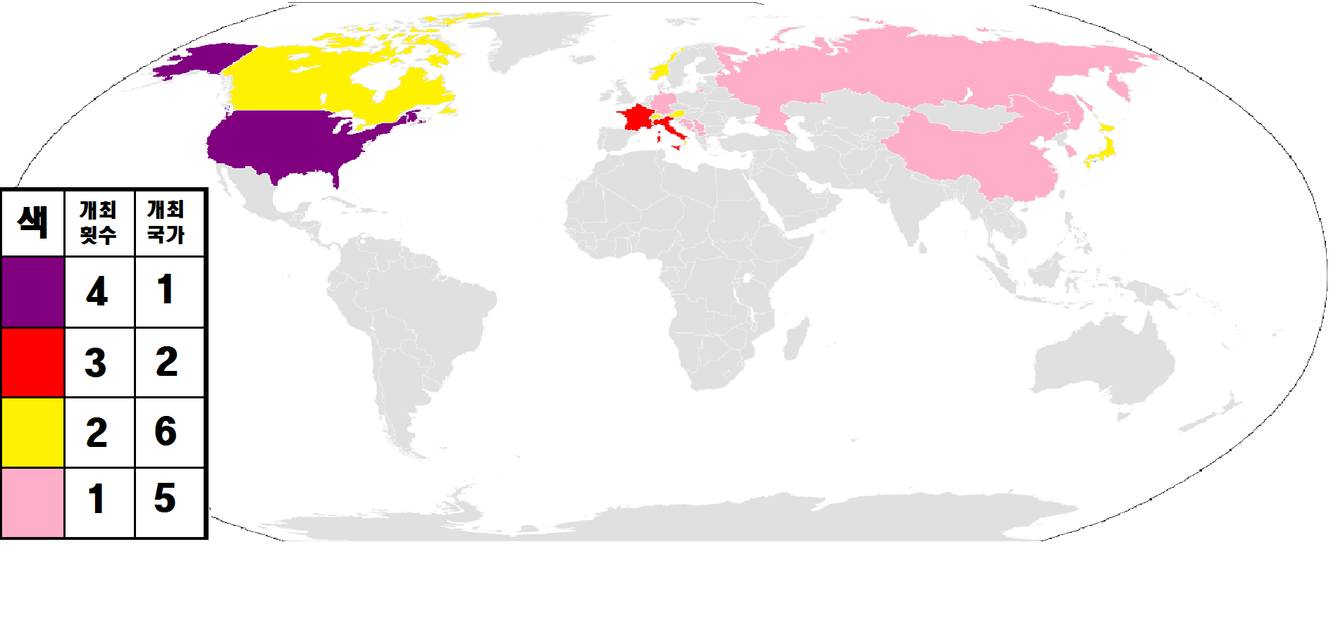 동계올림픽 개최지+개최예정지